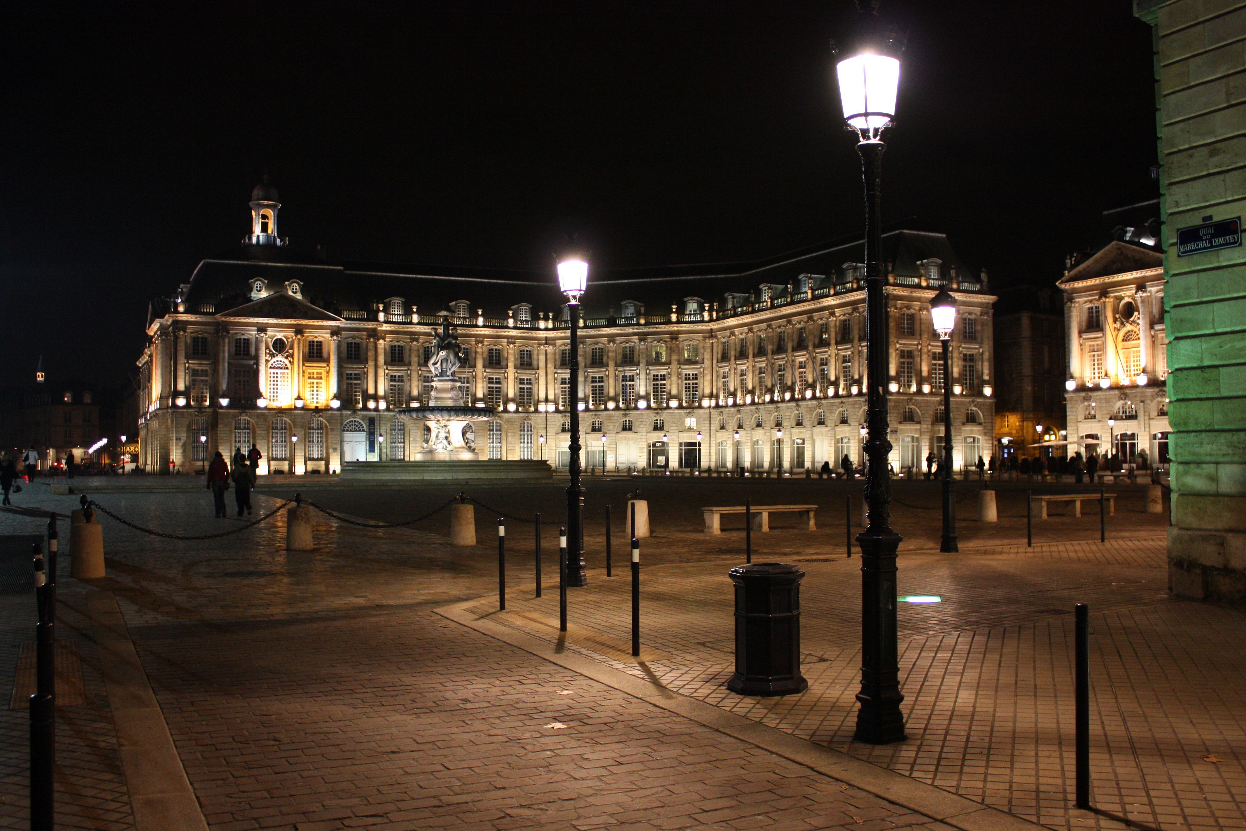 Le Musée des Douanes de Bordeaux (France). Au centre de l'image, la fontaine des Trois Grâces. .